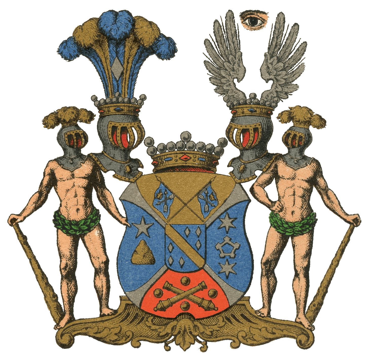 Vaakuna